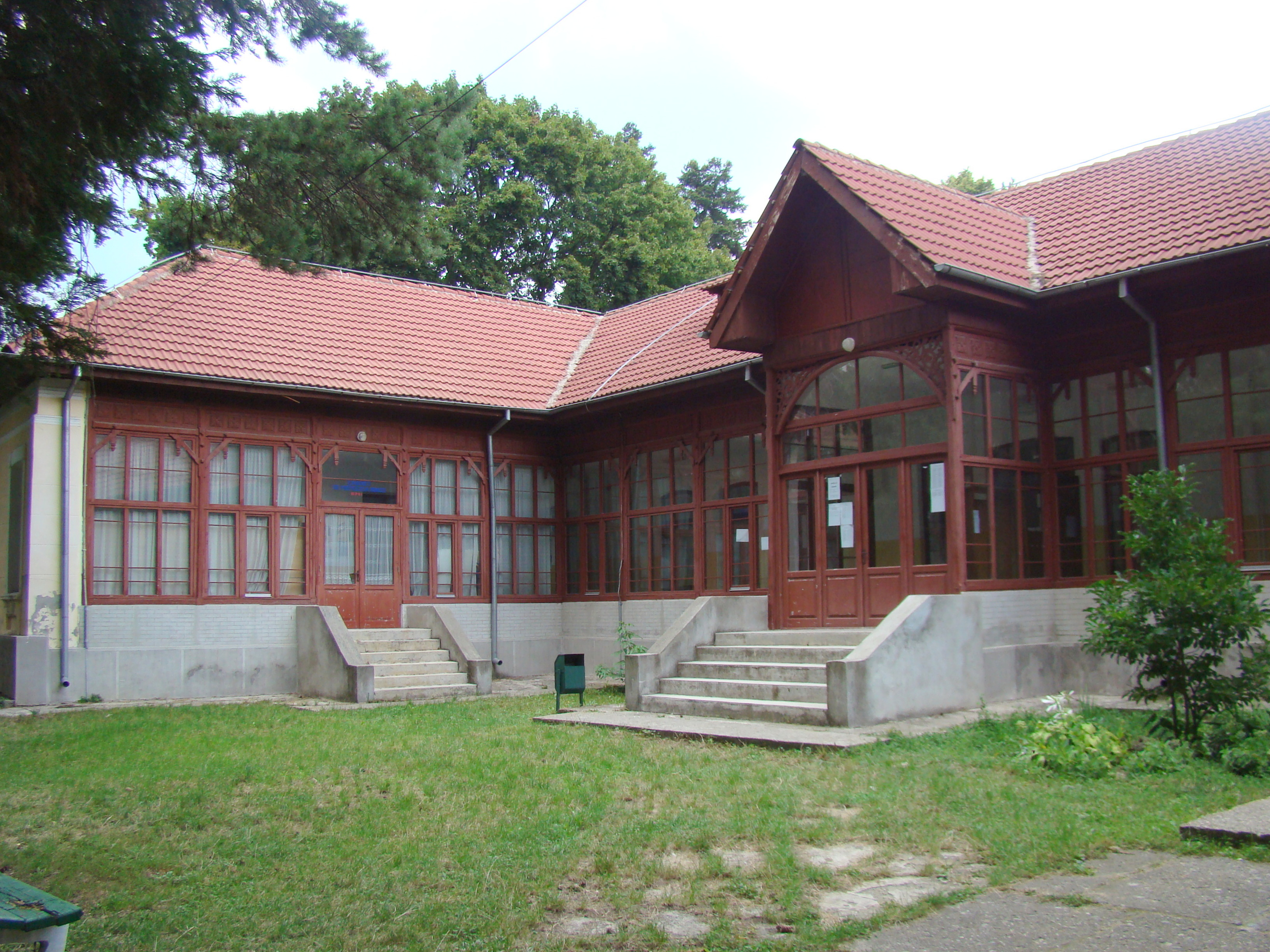 Seminarul Teologic Ortodox "Neagoe Vodă", azi Liceul Agricol "C. Dobrescu Argeș" 02